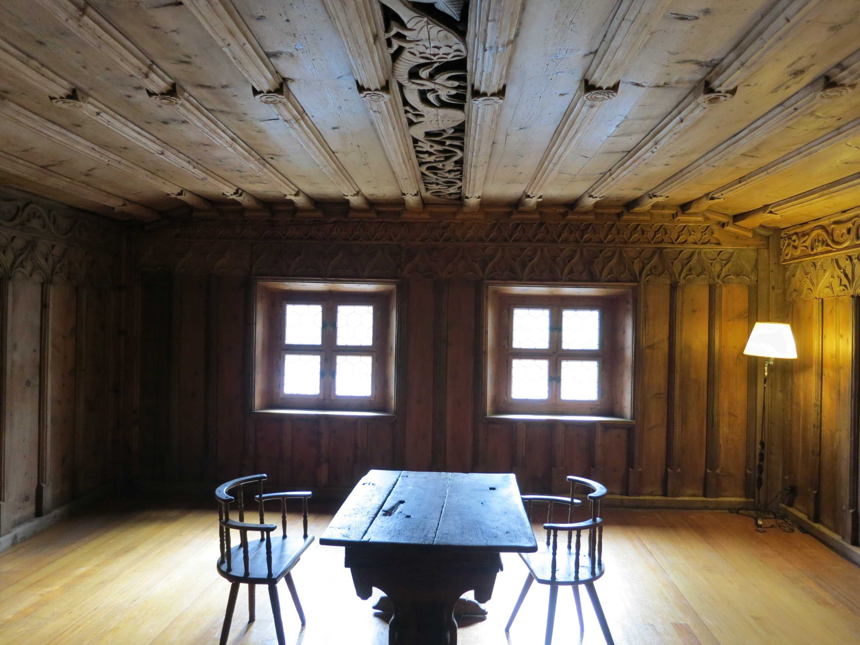 Bischöfliche Domänenverwaltung, Engadiner Musem St. Moritz GR, Schweiz